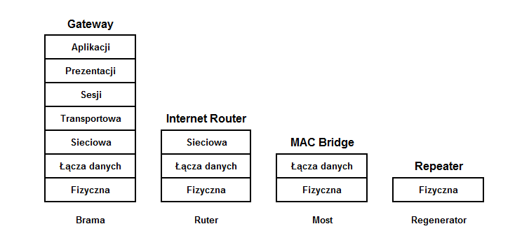 Warstwy do ktorych siegaja pakiety przy przechodzeniu przez urzadzenia sieciowe